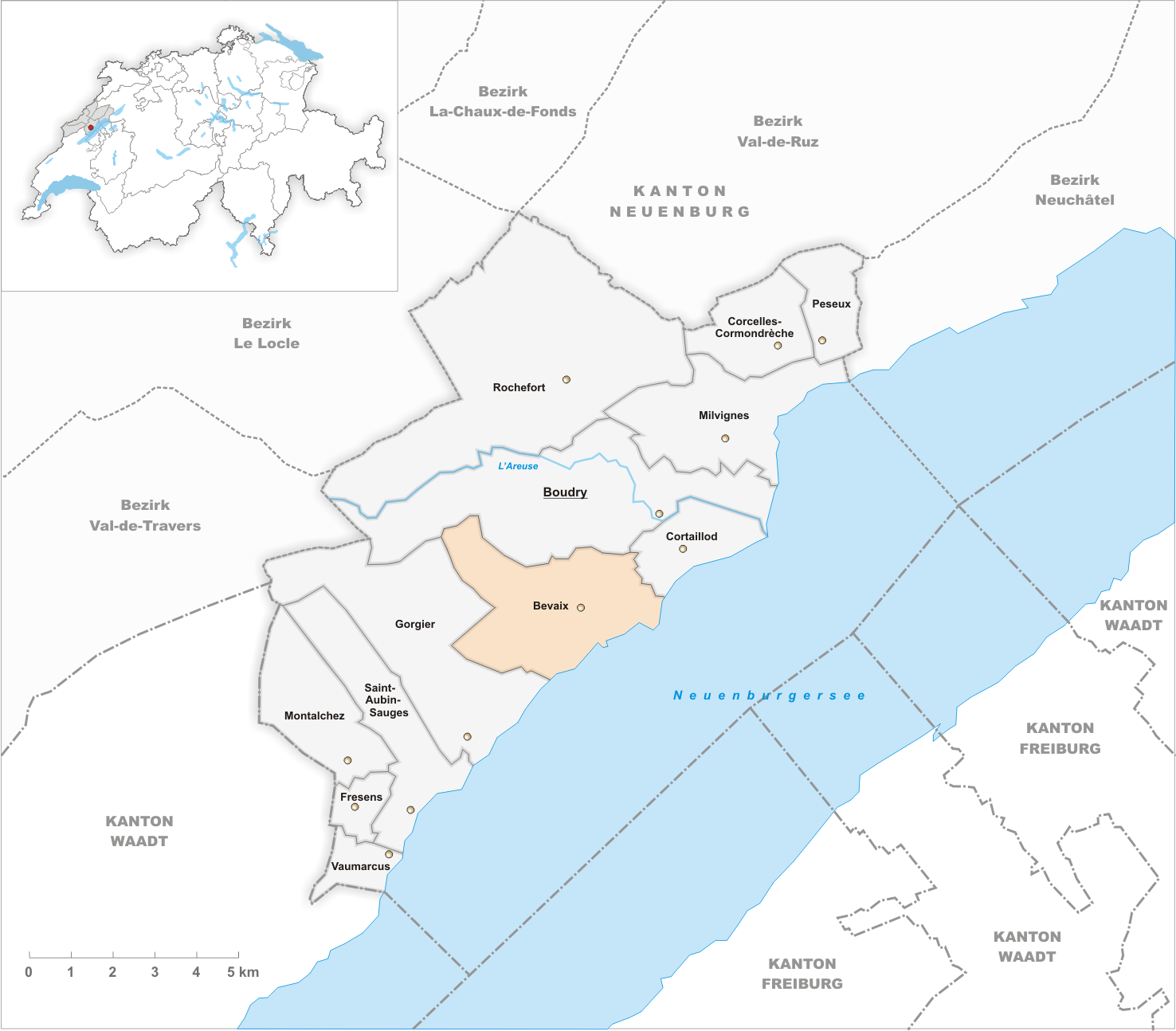 Municipality Bevaix